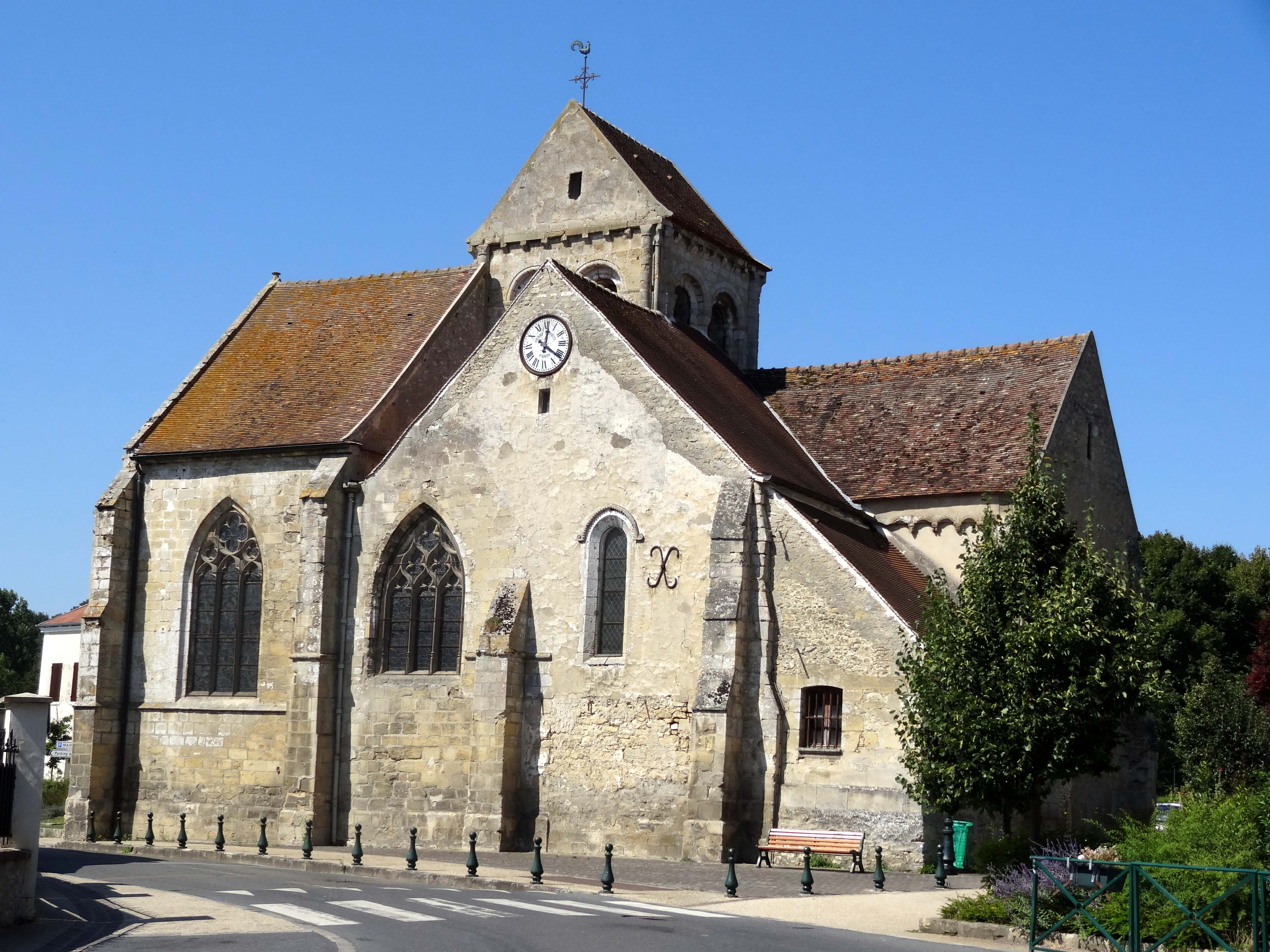 Église Saint-Sulpice de Seraincourt - voir titre.